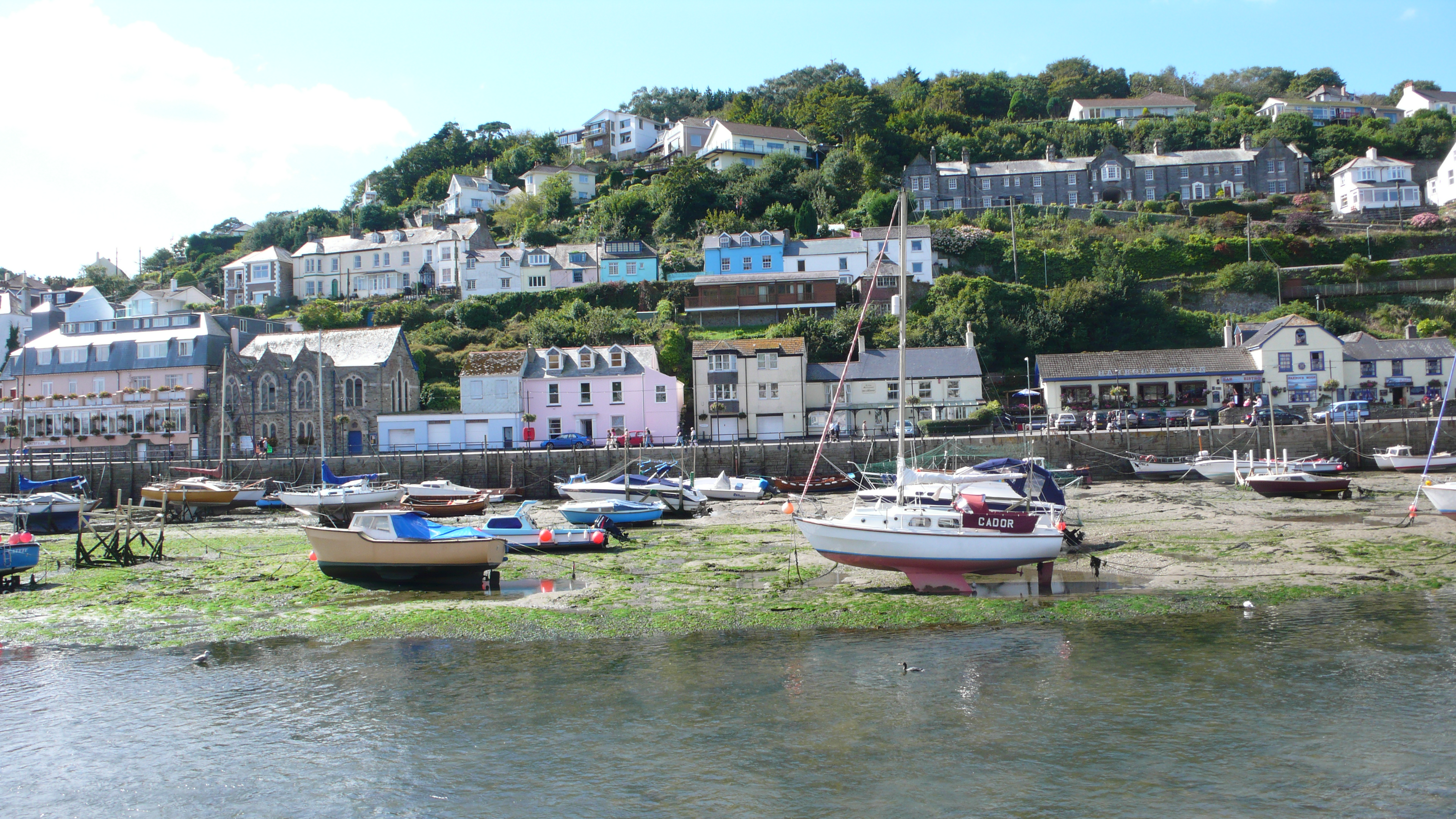 Looe Harbour